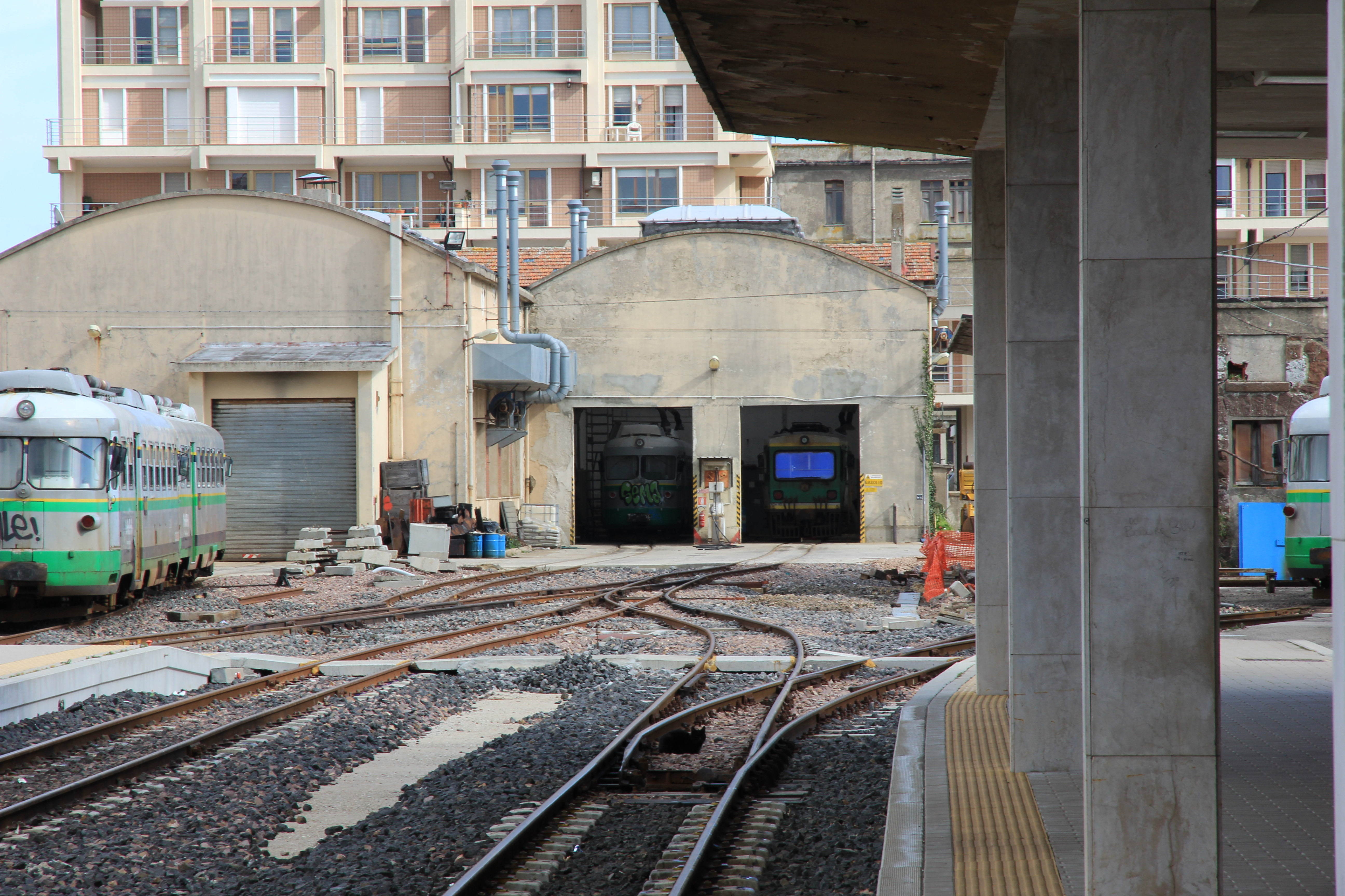 Macomer - Stazione ferroviaria ARST